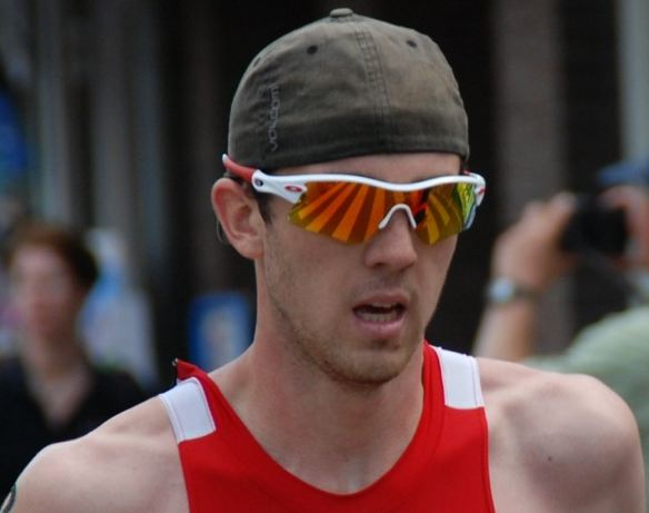 Niclas Bock